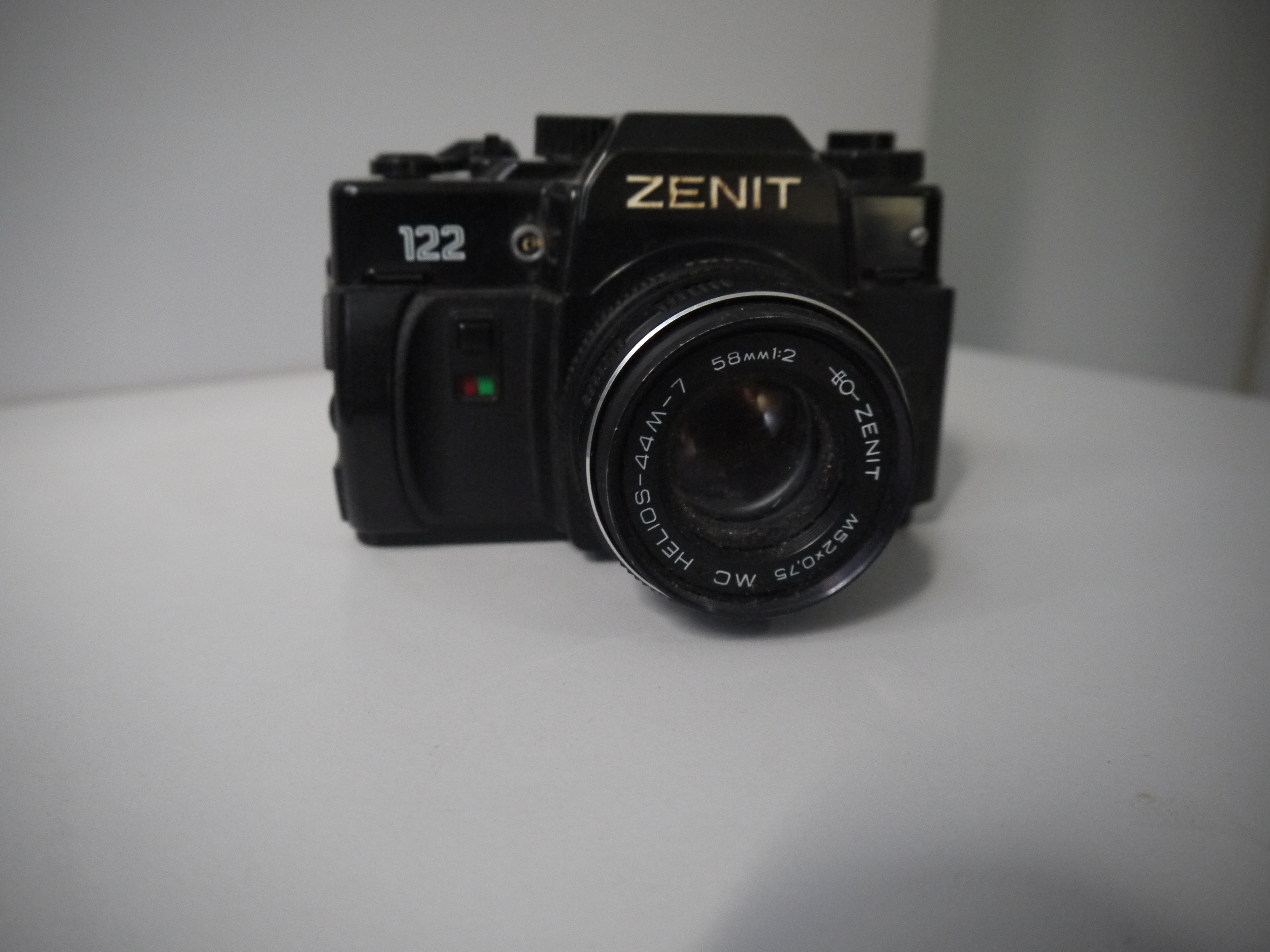 Zenit 122 fotocamera anni '60-'70